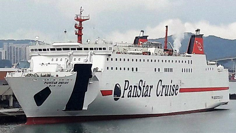 팬스타 드림호